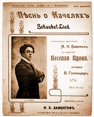 Обложка нот издательства Давингоф. «Песнь о качелях» В.Голлендора, с которой Михаил Вавич стал знаменитым (в 1906 году)